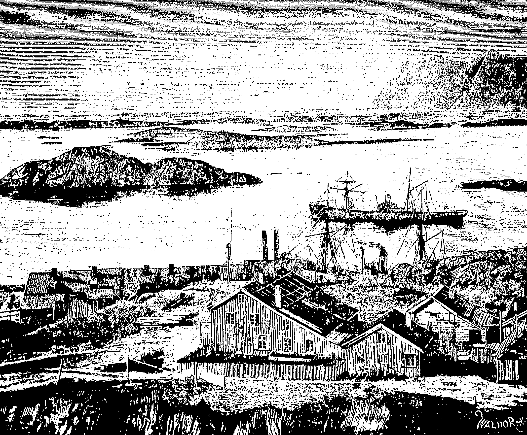 Senja nikkelverk på Hamn i Berg på Senja.